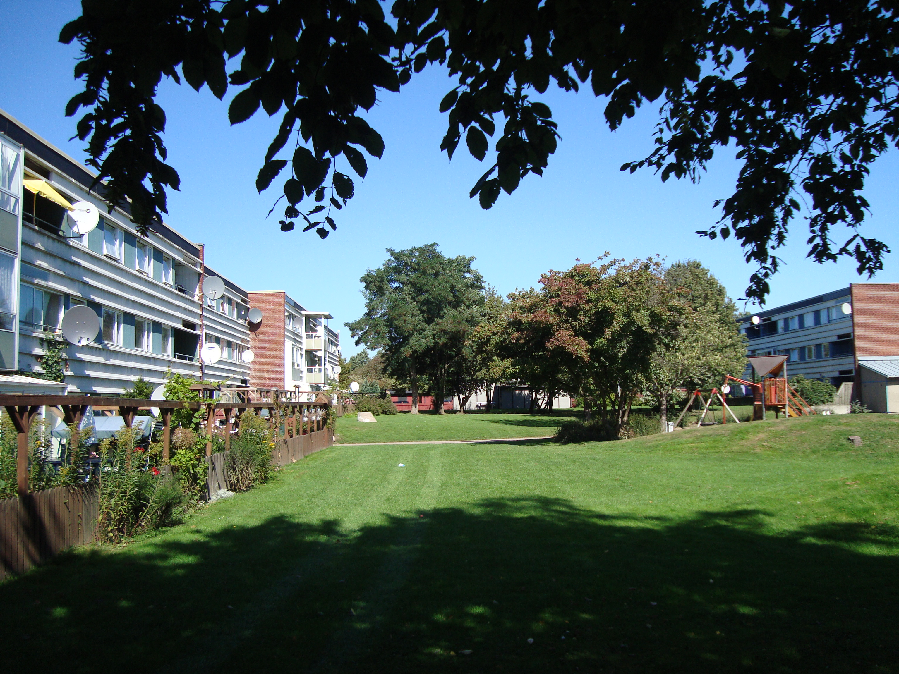 Bostadshus i Drottninghög i Helsingborg.